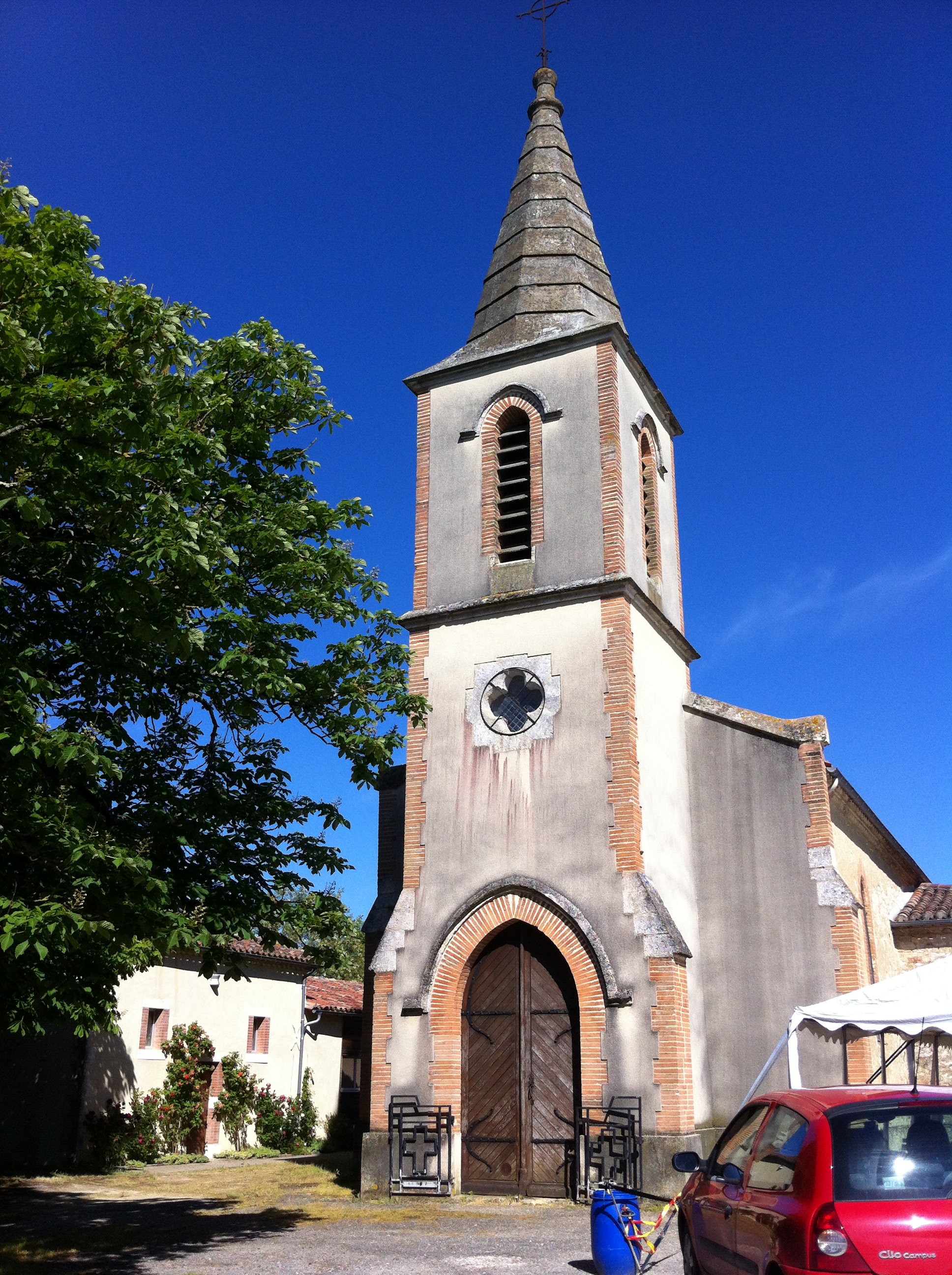 Eglise d'Augnax, Gers (France), village situé près d'Auch